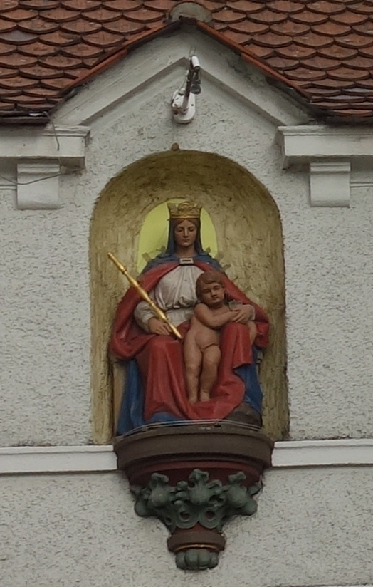 Wirtshaus am Bock Marienskulptur